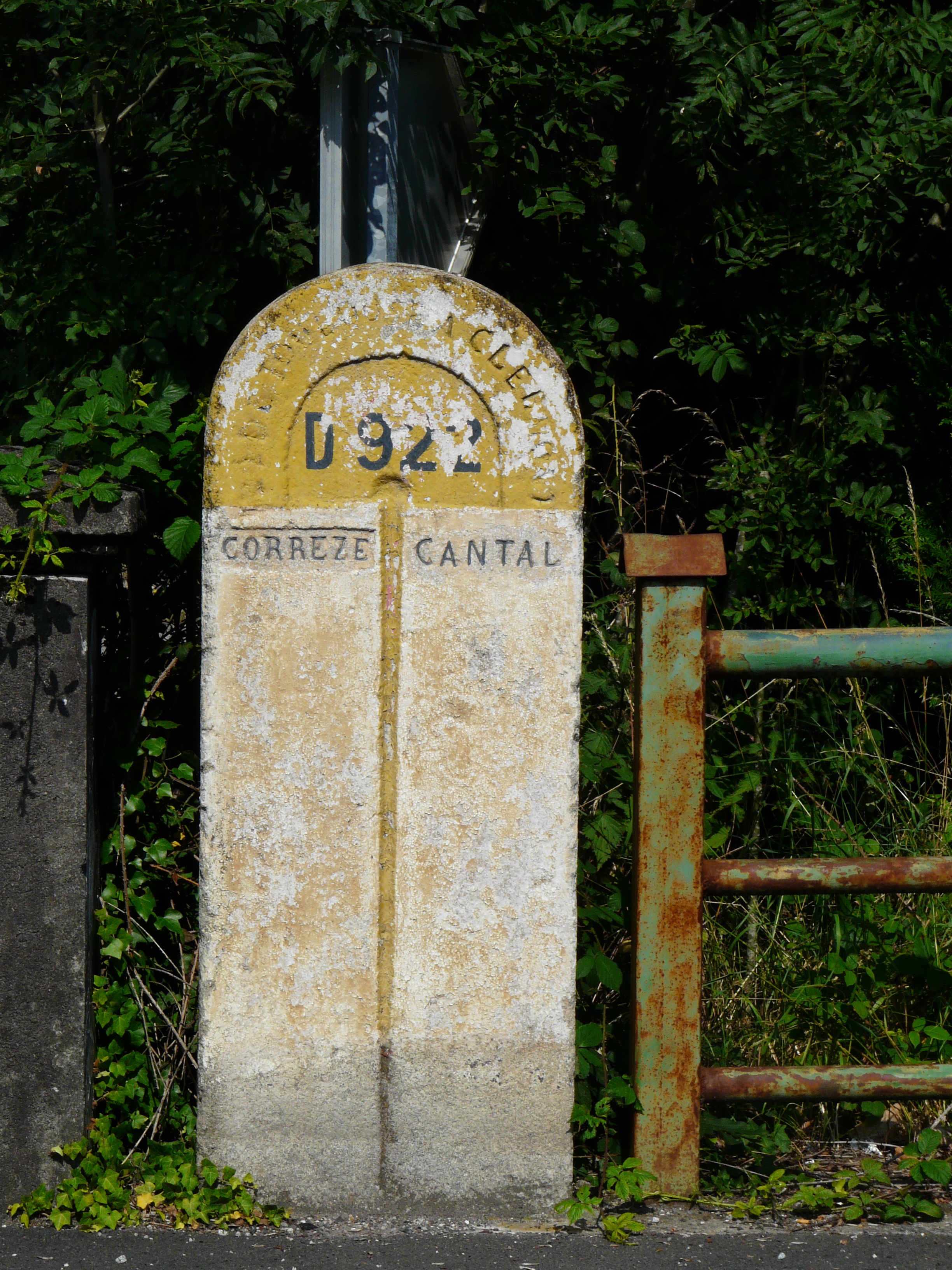 Borne de limites départementales sur la route départementale 922 (ancienne route nationale 122) entre la Corrèze (Bort-les-Orgues) et le Cantal (Lanobre).